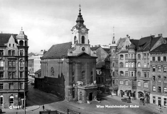 Florianikirche in einer alten Ansicht